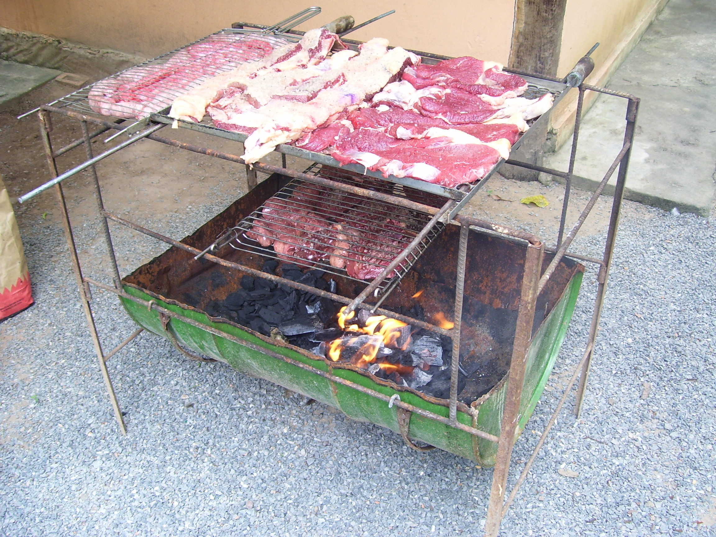 Churrasco tipicamente brasileiro/Brazilian churrasco (steak grilled)